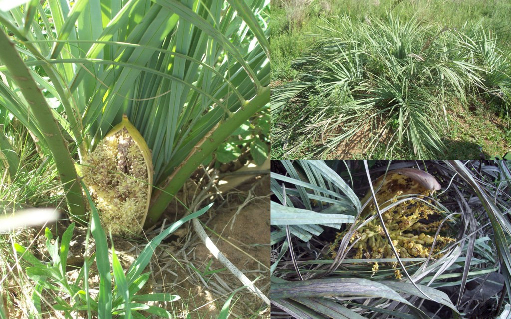 Butia lallemantii. Arecaceae. Fotos tomadas en Platón en suelo húmedo arenoso-rojizo, departamento de Rivera, Uruguay.